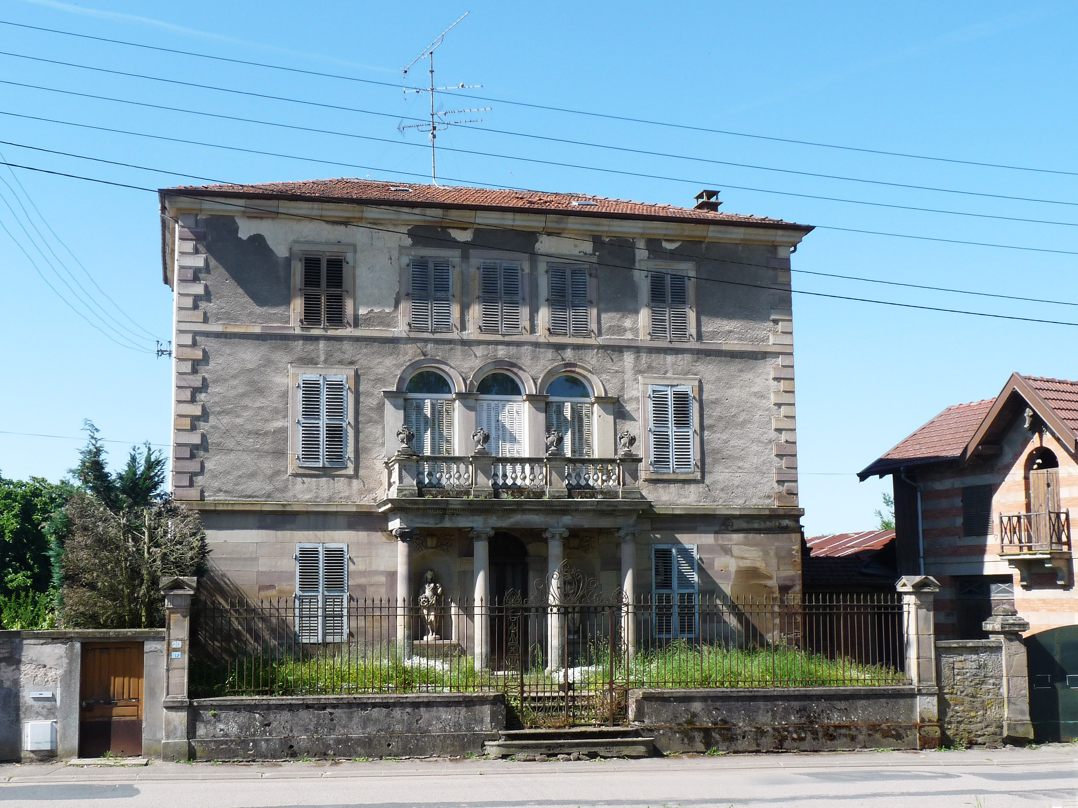 Rambervillers (Vosges) : maison particulière